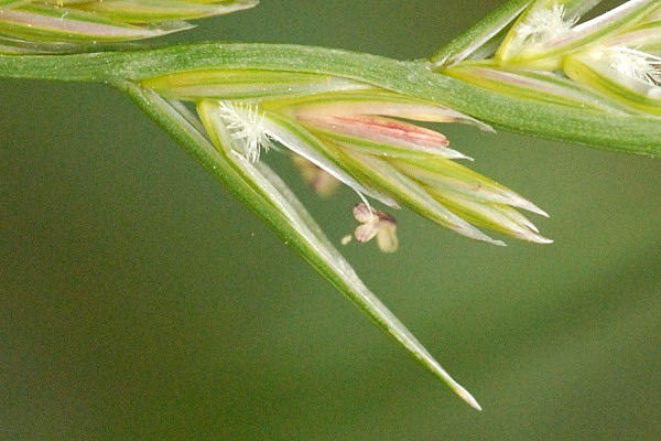 Lolium perenne from Commanster, Belgian High Ardennes .